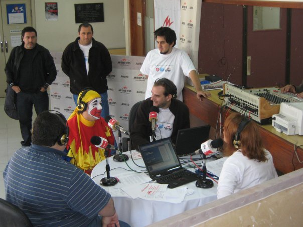 Estudio móvil de Mitre 810 transmitiendo en la campaña solidaria Maratón del papel desde el Hospital Materno Infantil de Córdoba.